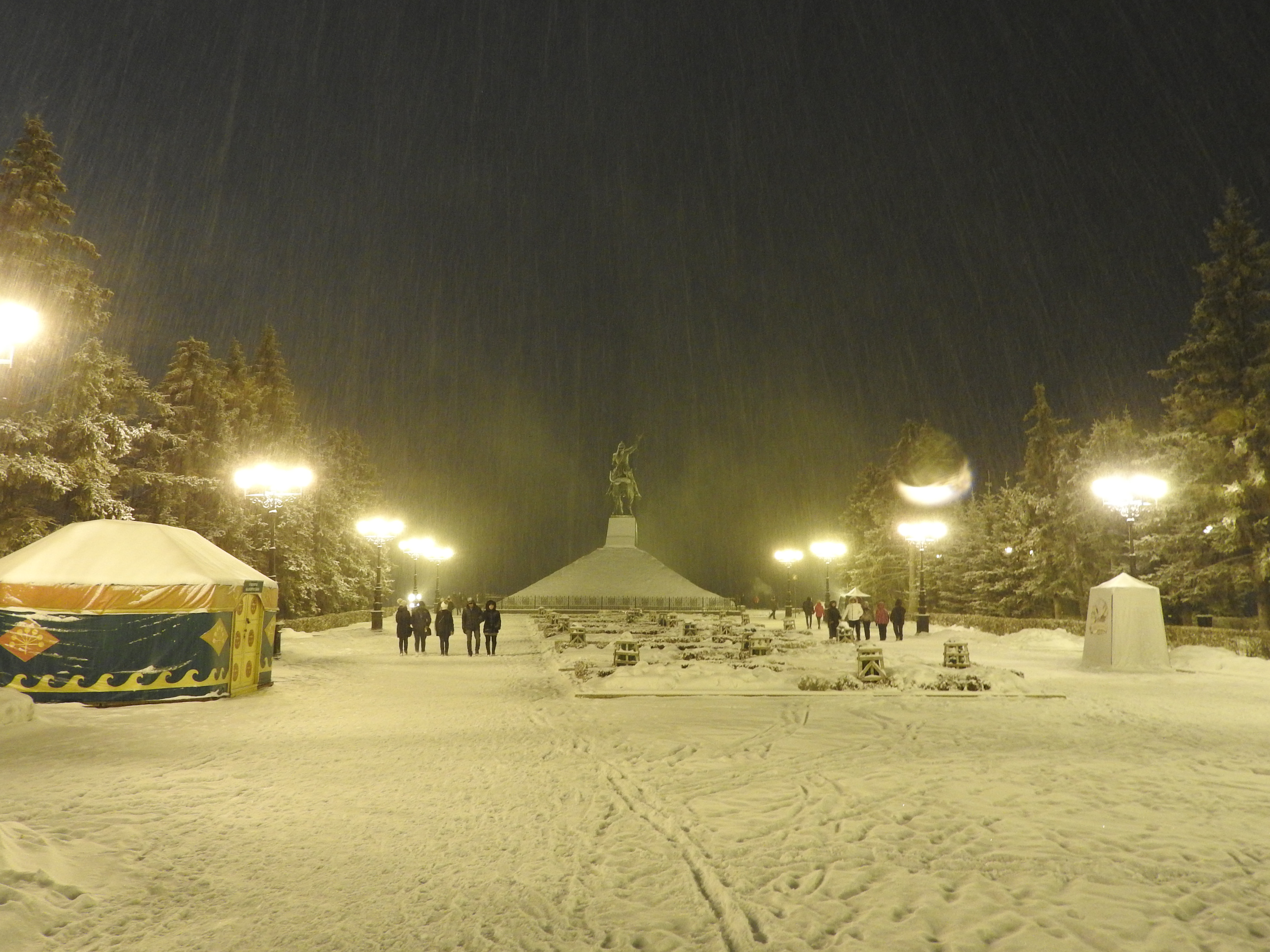 Башҡортса: Салауат Юлаев майҙаны ҡышҡы буранда